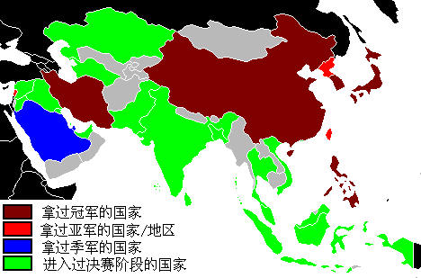 亞錦賽取得最佳成績的國家地圖。